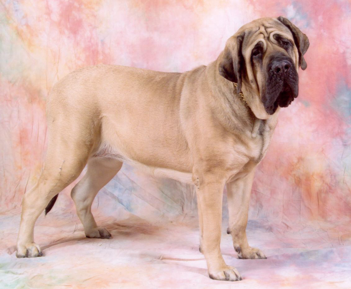 Mastiff Esmeralda Krozairs of Kregen